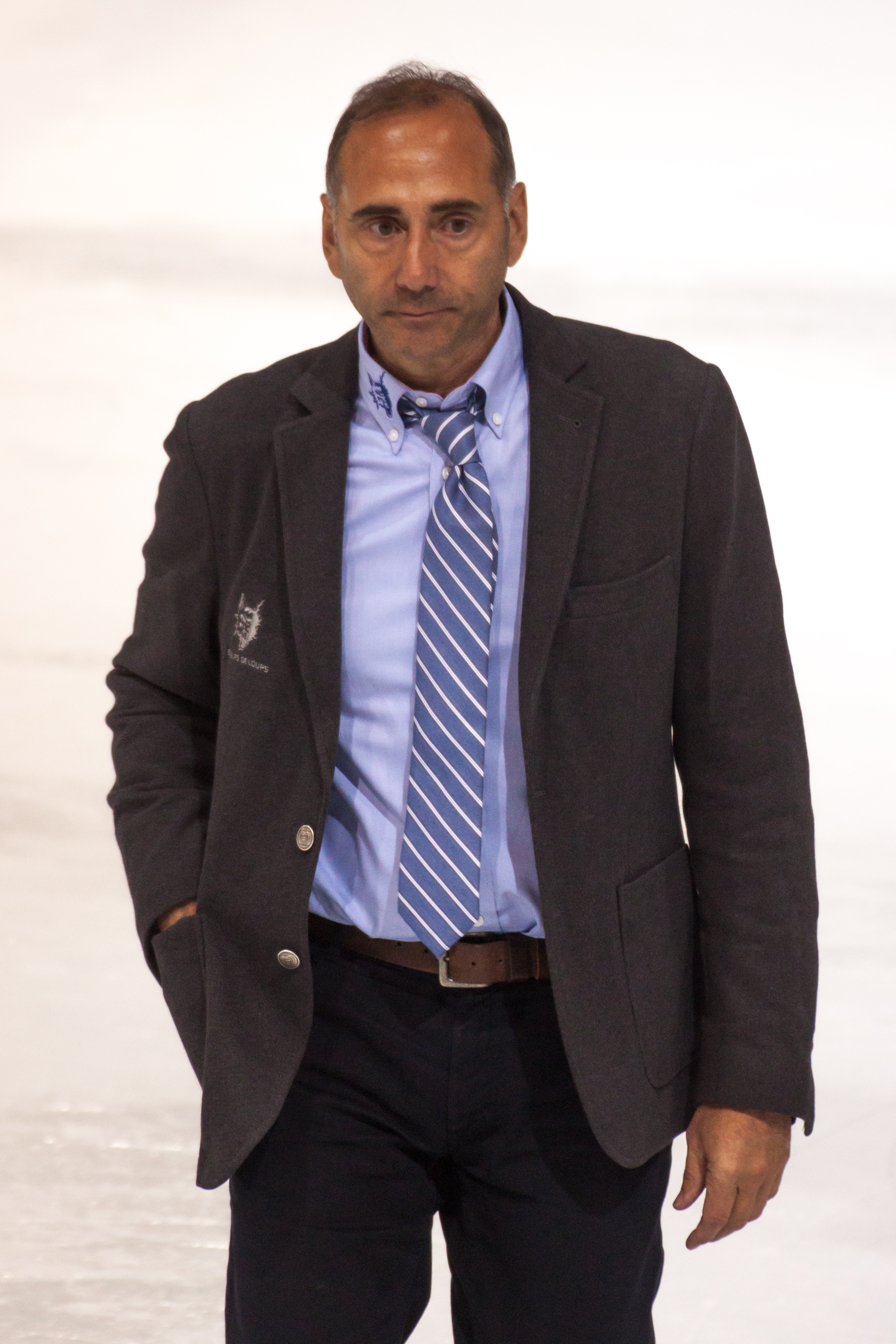 Richard Martel, coach des Bruleurs de Loups de Grenoble lors du match Bruleurs de Lous - Senators de Bighampton